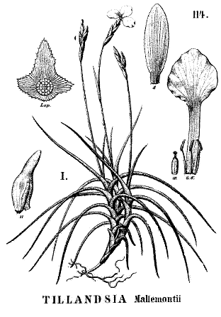 Martius, Fl. Brasil